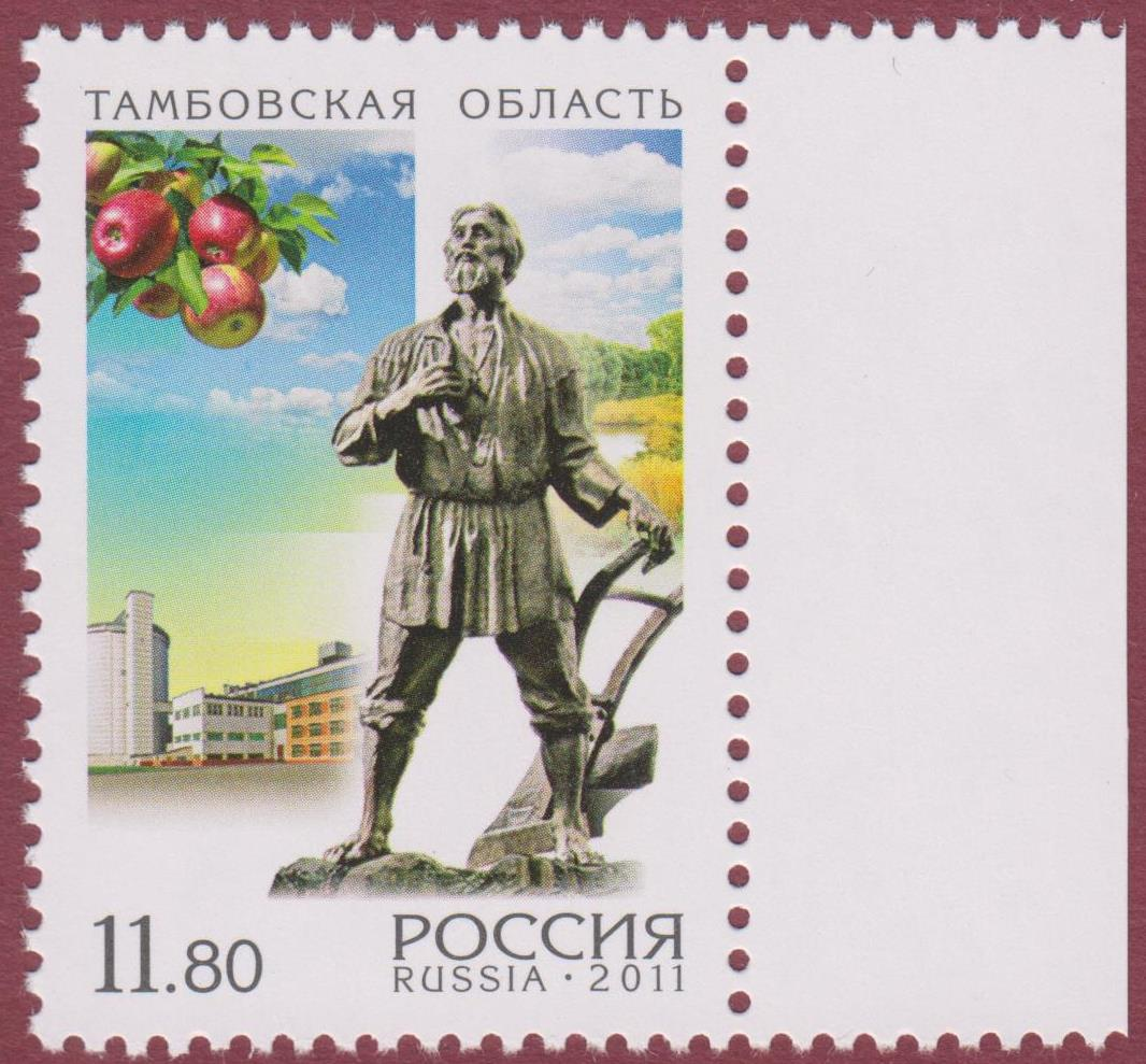 Марка посвященная Тамбовской области с изображением памятника "Тамбовскому мужику"